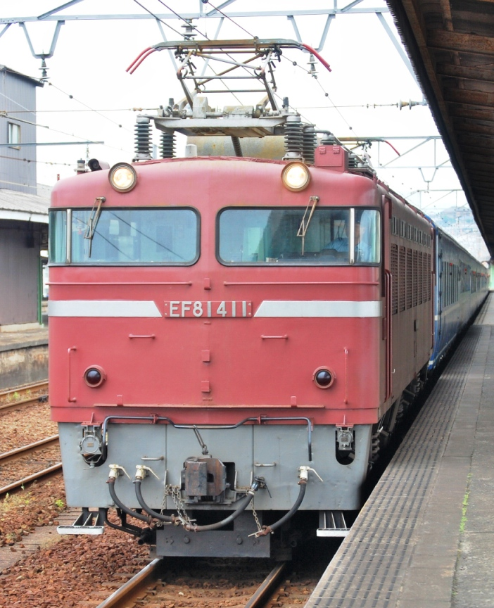 国鉄EF81形電気機関車411号車